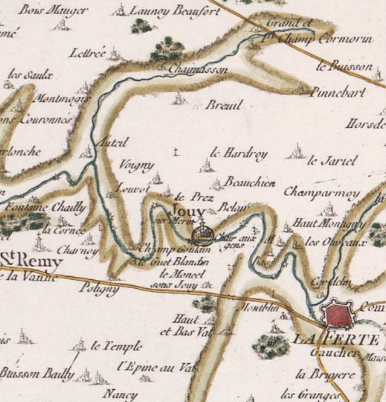 extrait sur la paroisse de Jouy-sur-Morin, de la carte dire "de Cassini" (planche 45 de Meaux, feuille 4).